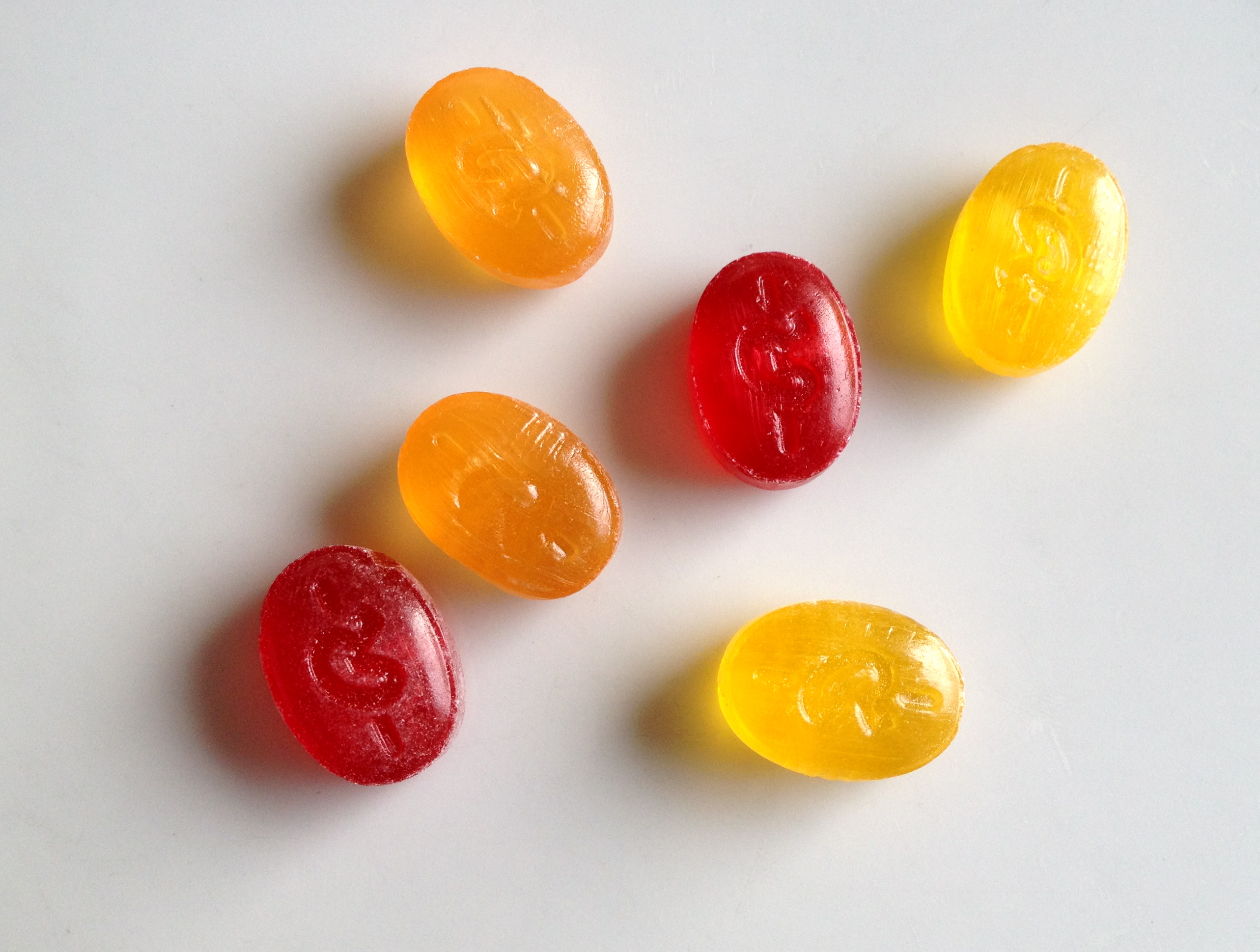 Ricola Bonbons Sgraffito